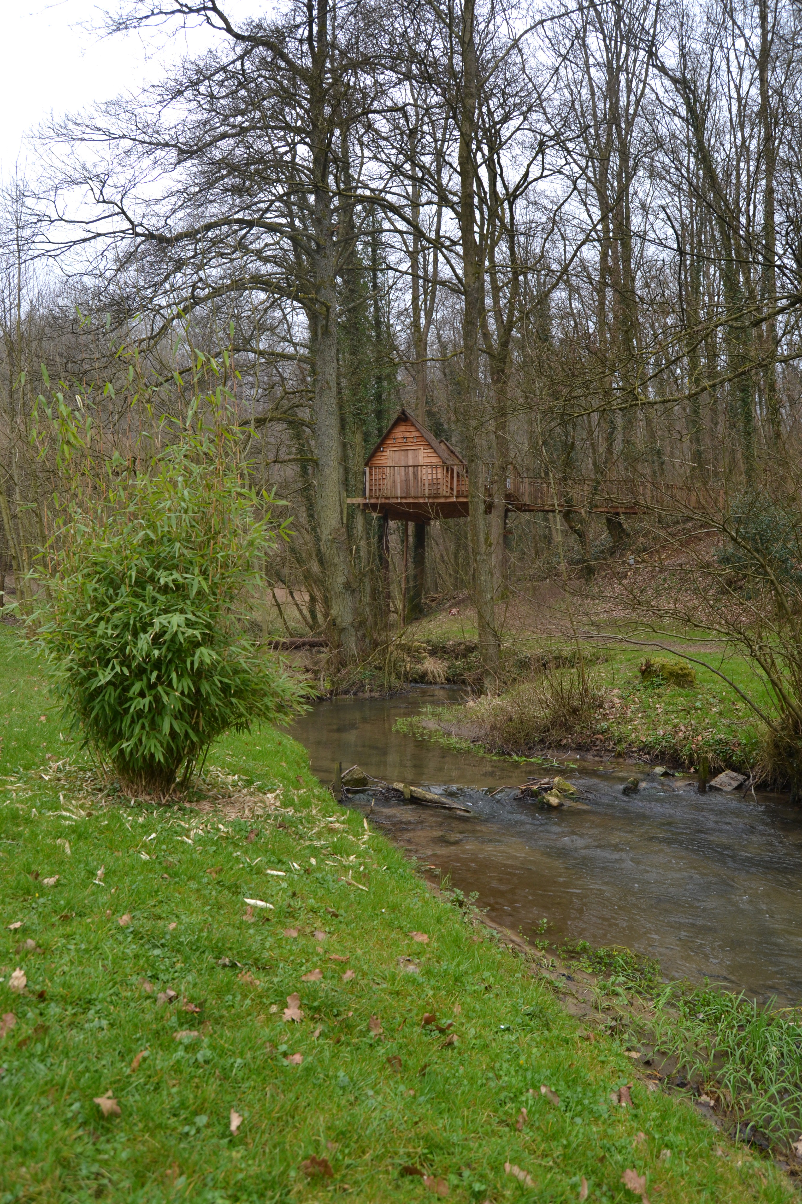 La cabane de Diego (